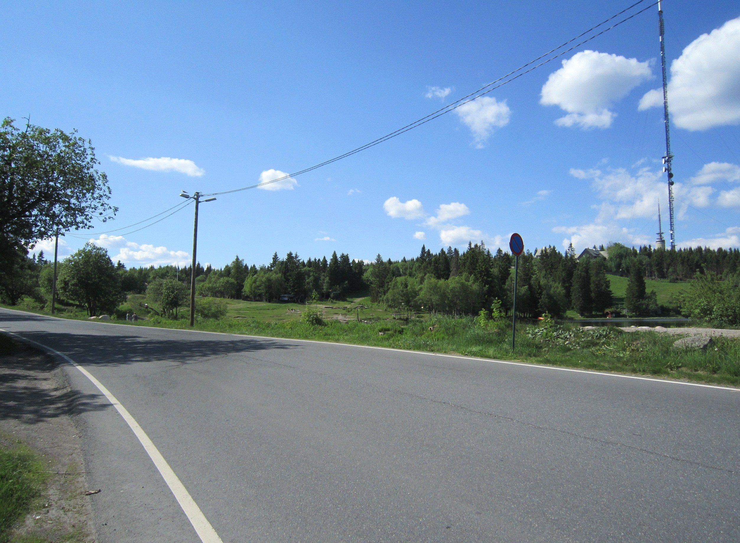 Øvreseterveien i Oslo, med Øvresetertjern til høyre